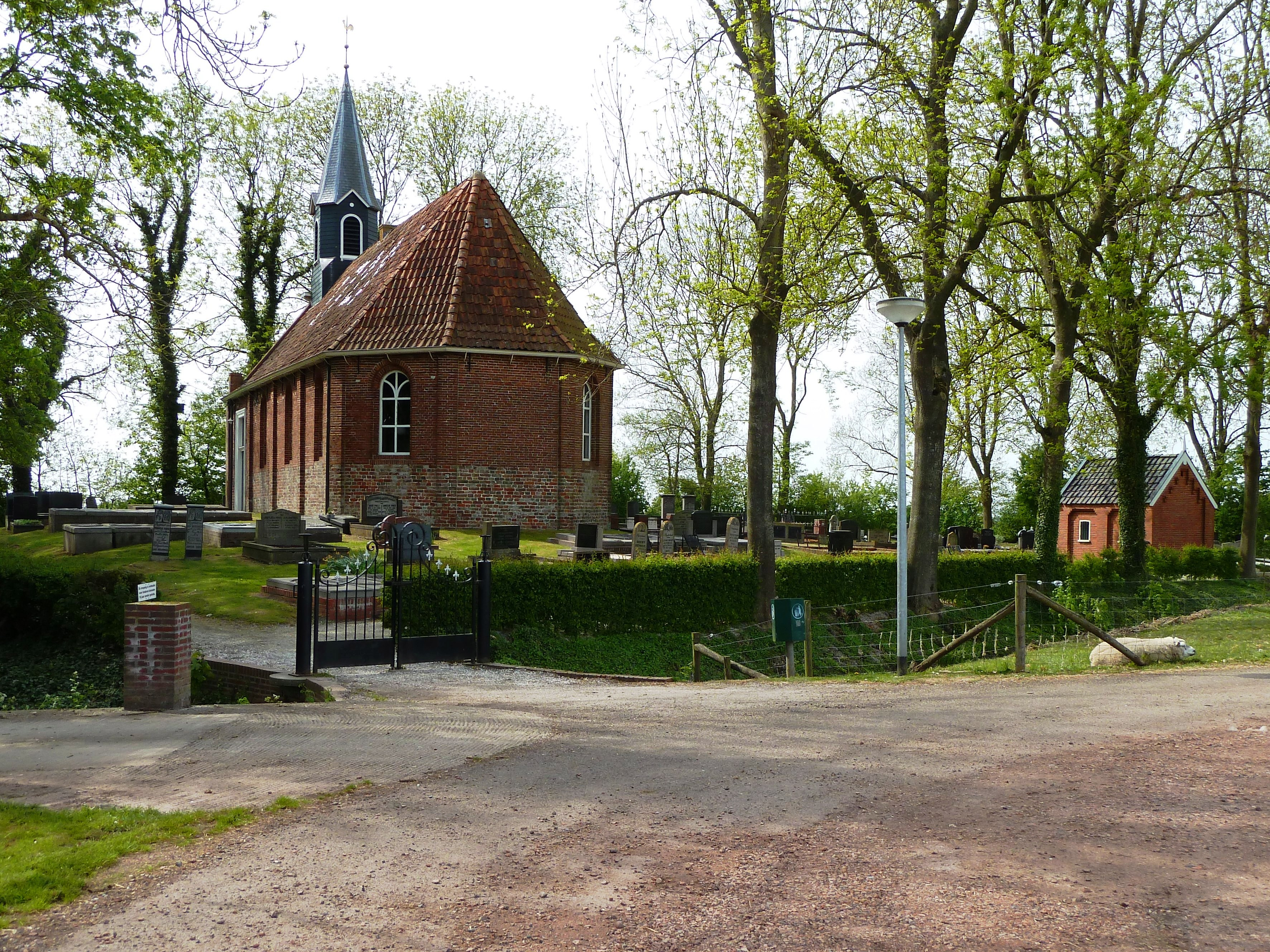 Hervormde kerk van Den Ham (Groningen, Nederland).